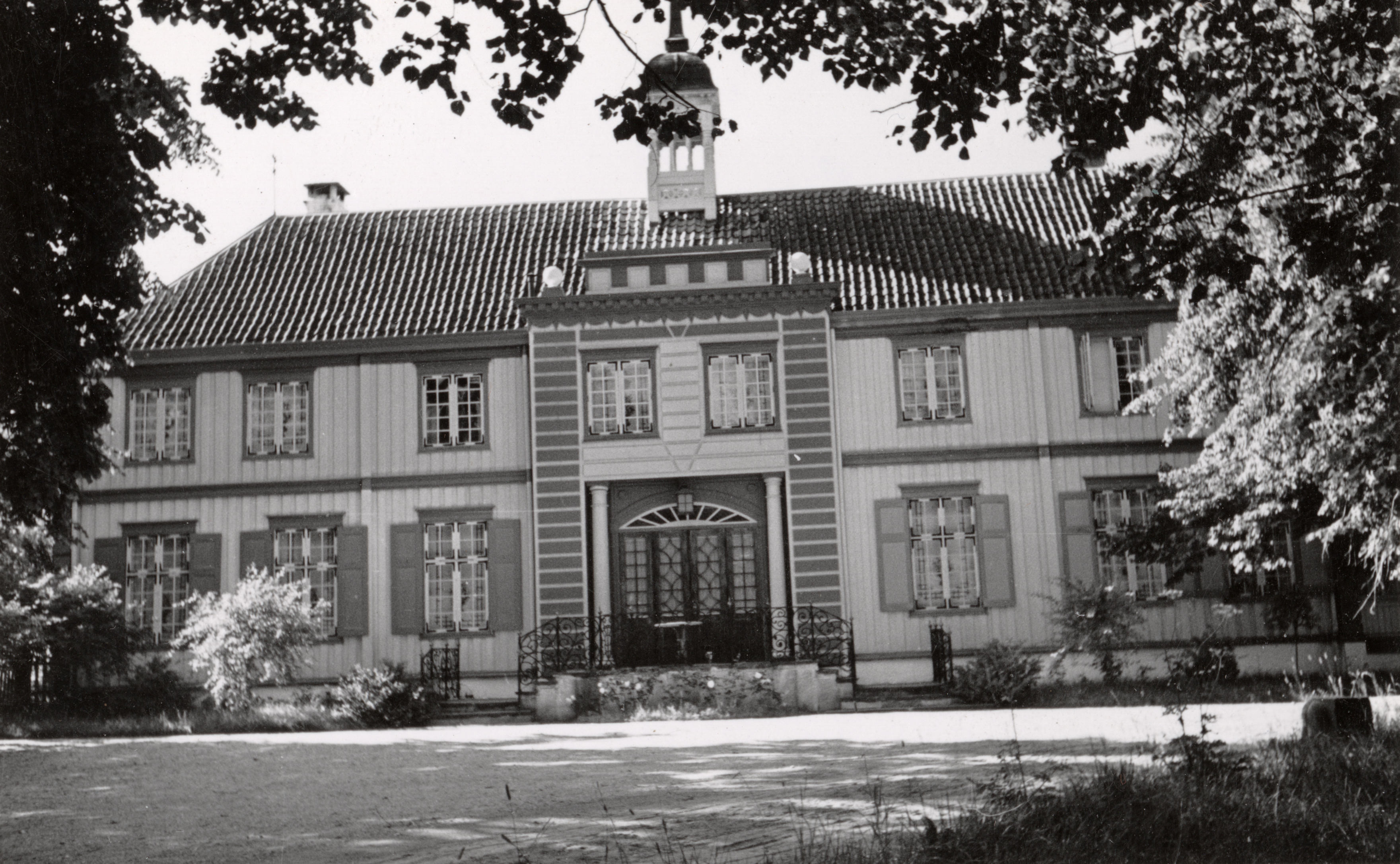 Leangen Nordre i Strinda, Sør-Trøndelag